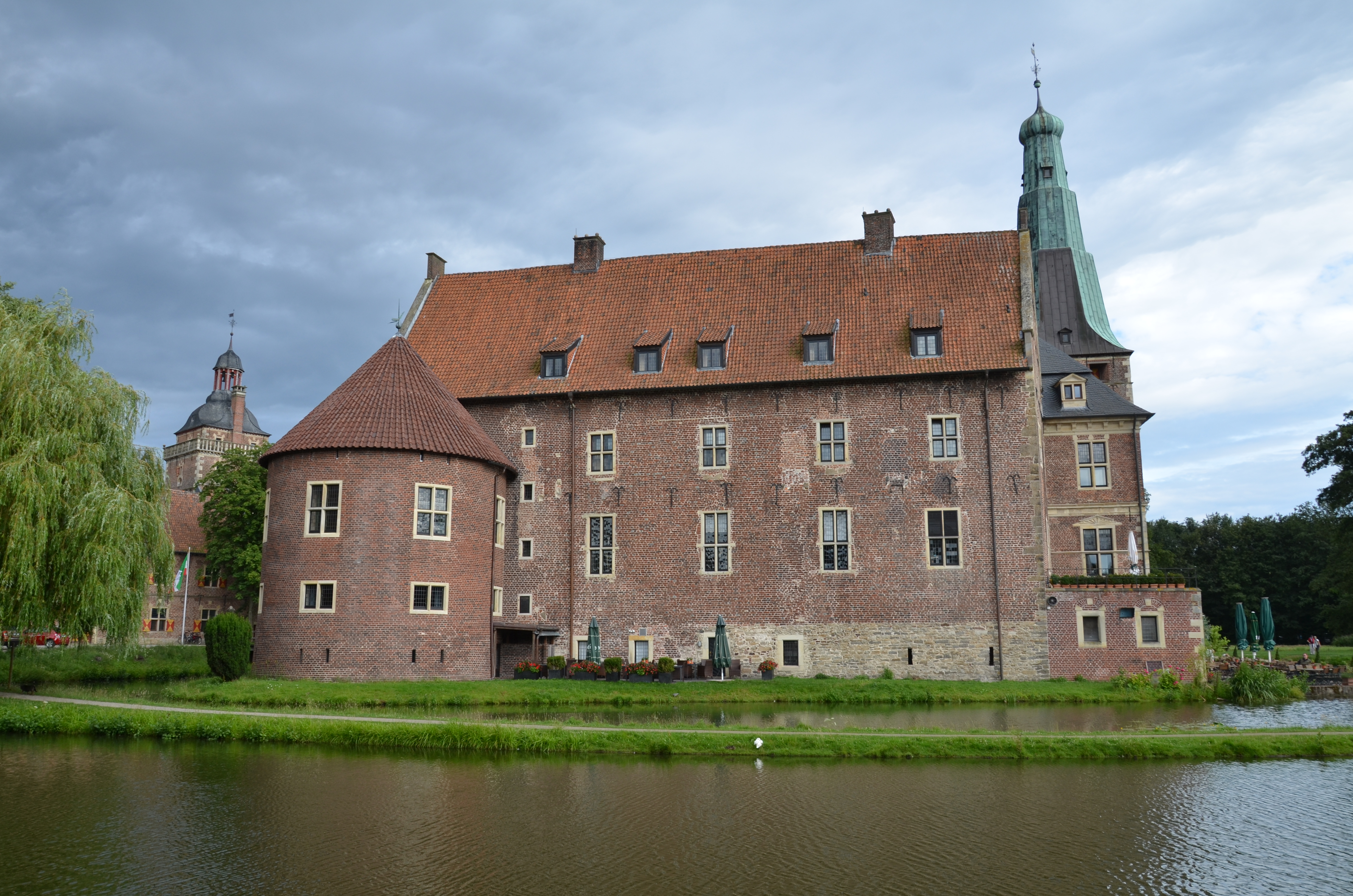 Schloss Raesfeld